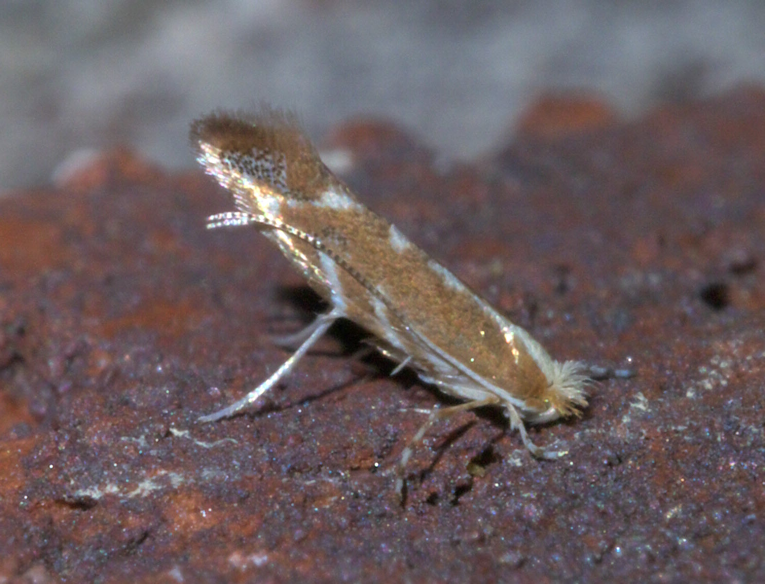 Cameraria quercivorella, Hodges #0835, ID Confidence: 88